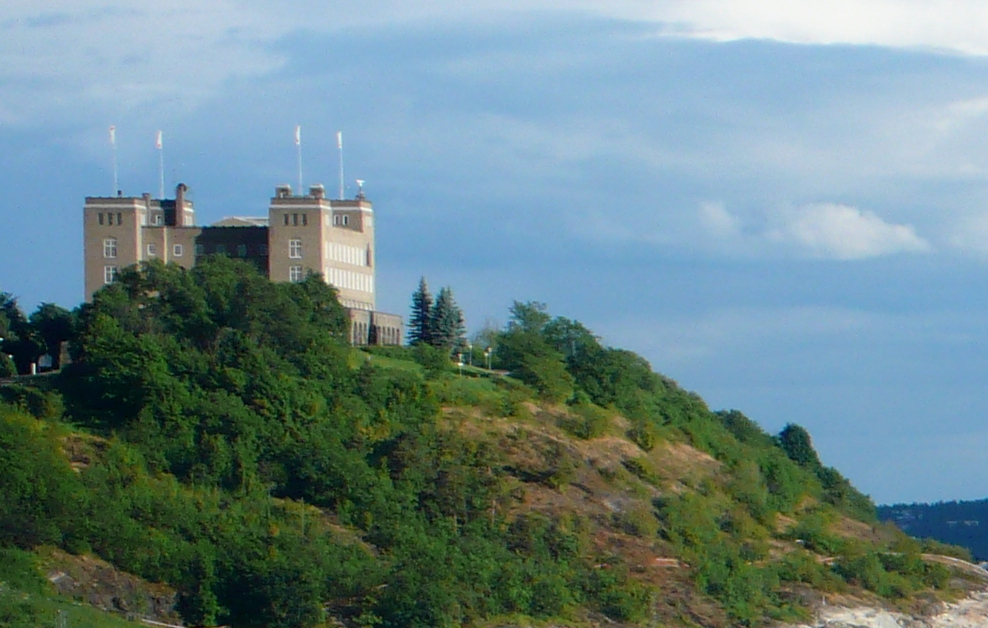 Sjømannsskolen i Ekebergskråninga i Oslo